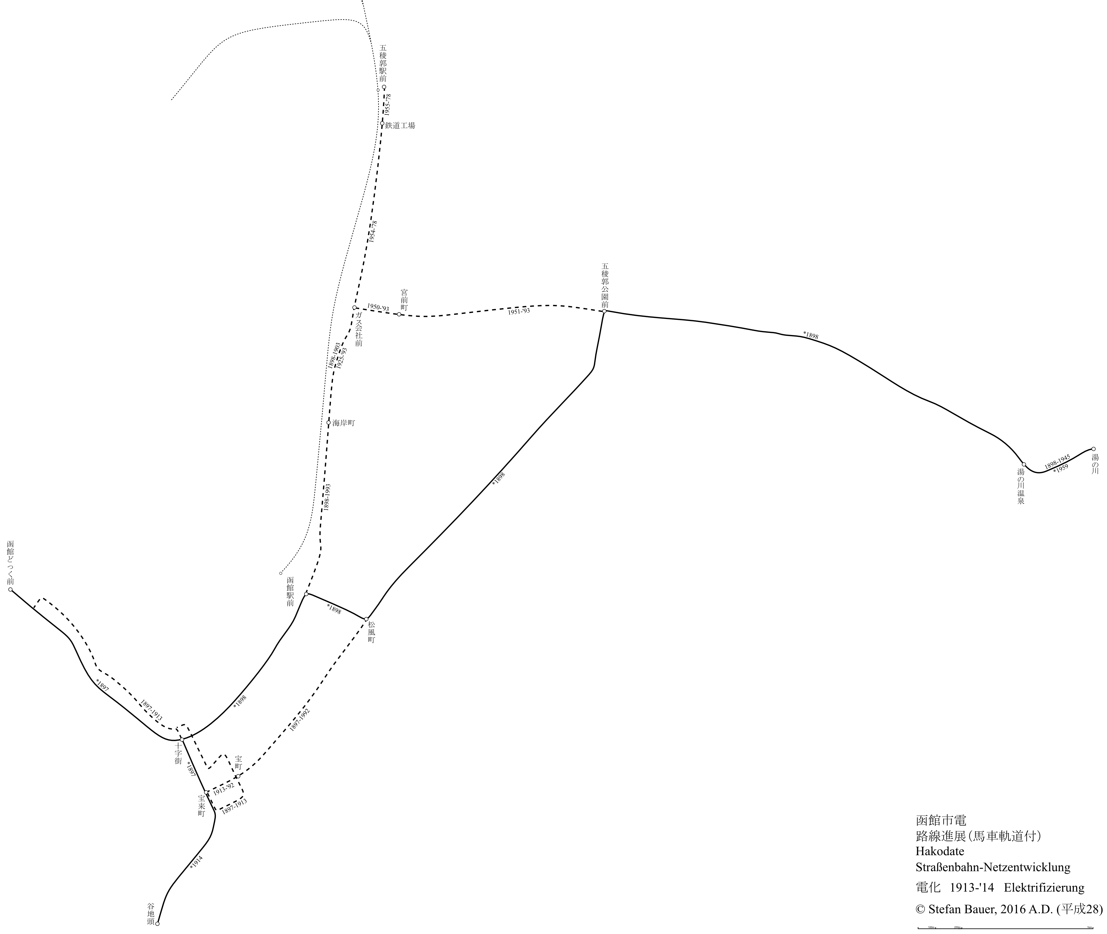 函館市電の路線進展図